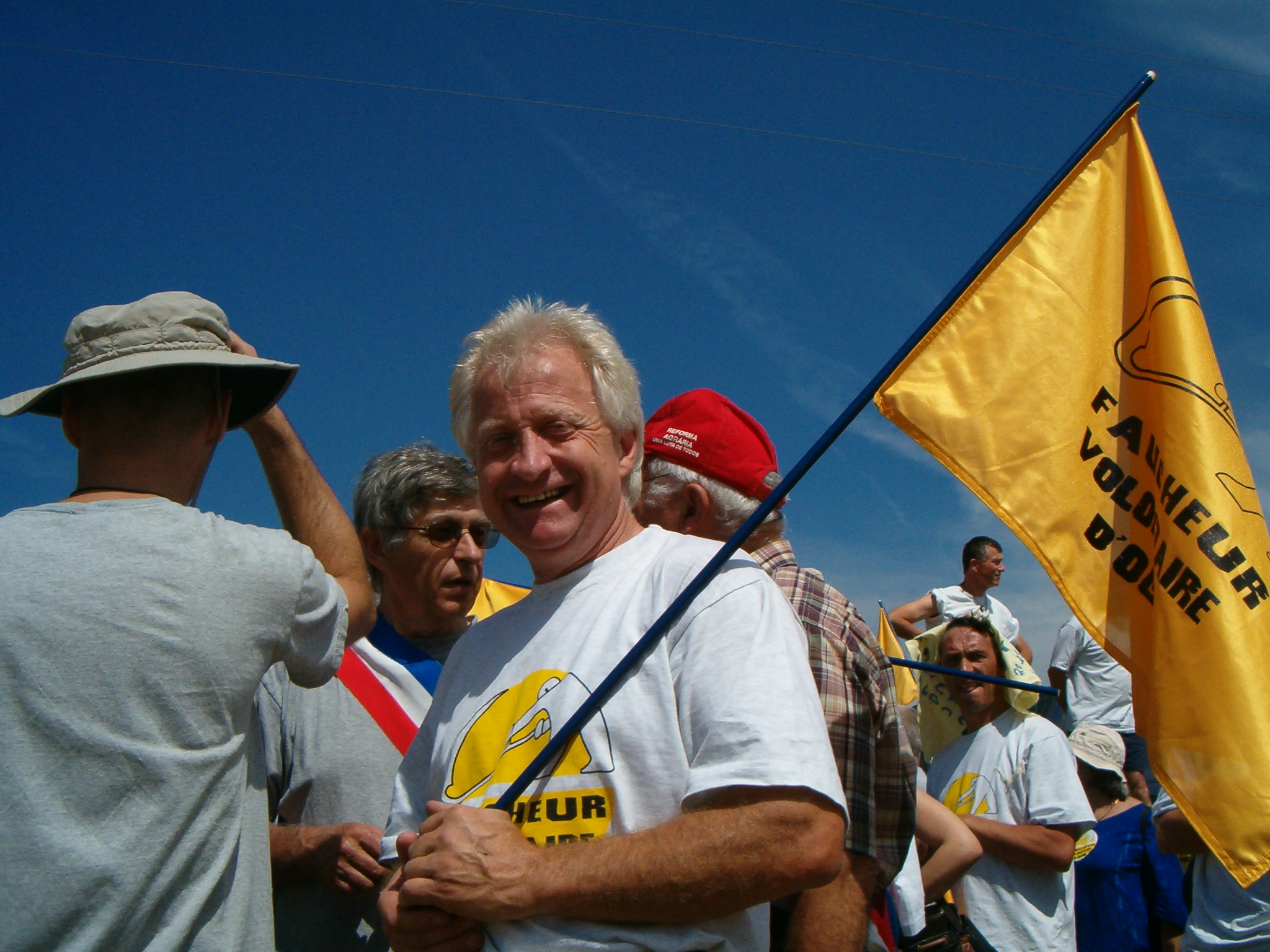 François Dufour, ancien porte-parole de la Confédération paysanne, Vice-Président d'ATTAC France, lors de une manifestation contre les OMG le 14 juilet 2004